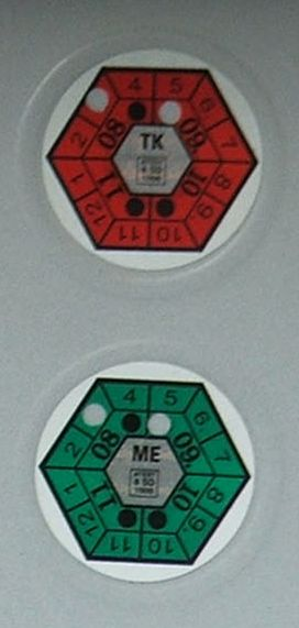 Známky (nálepky) technické kontroly a měření emisí (viz článek o nich). Lepí se na základě vyhlášky 103/1995 Sb.